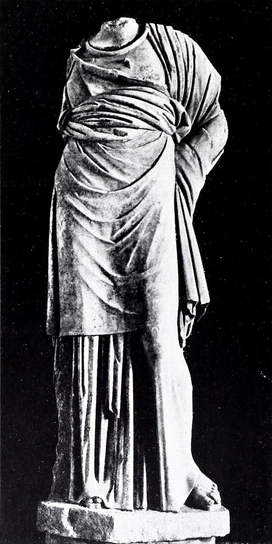 Illustrazioni di Benevento da Almerico Meomartini, Benevento, Istituto Italiano d'Arti Grafiche, Bergamo 1909